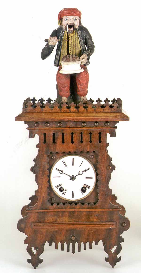 Anton Haeckler, Voehrenbach, um 1870 (Deutsches Uhrenmuseum, Inv. 06-2080)